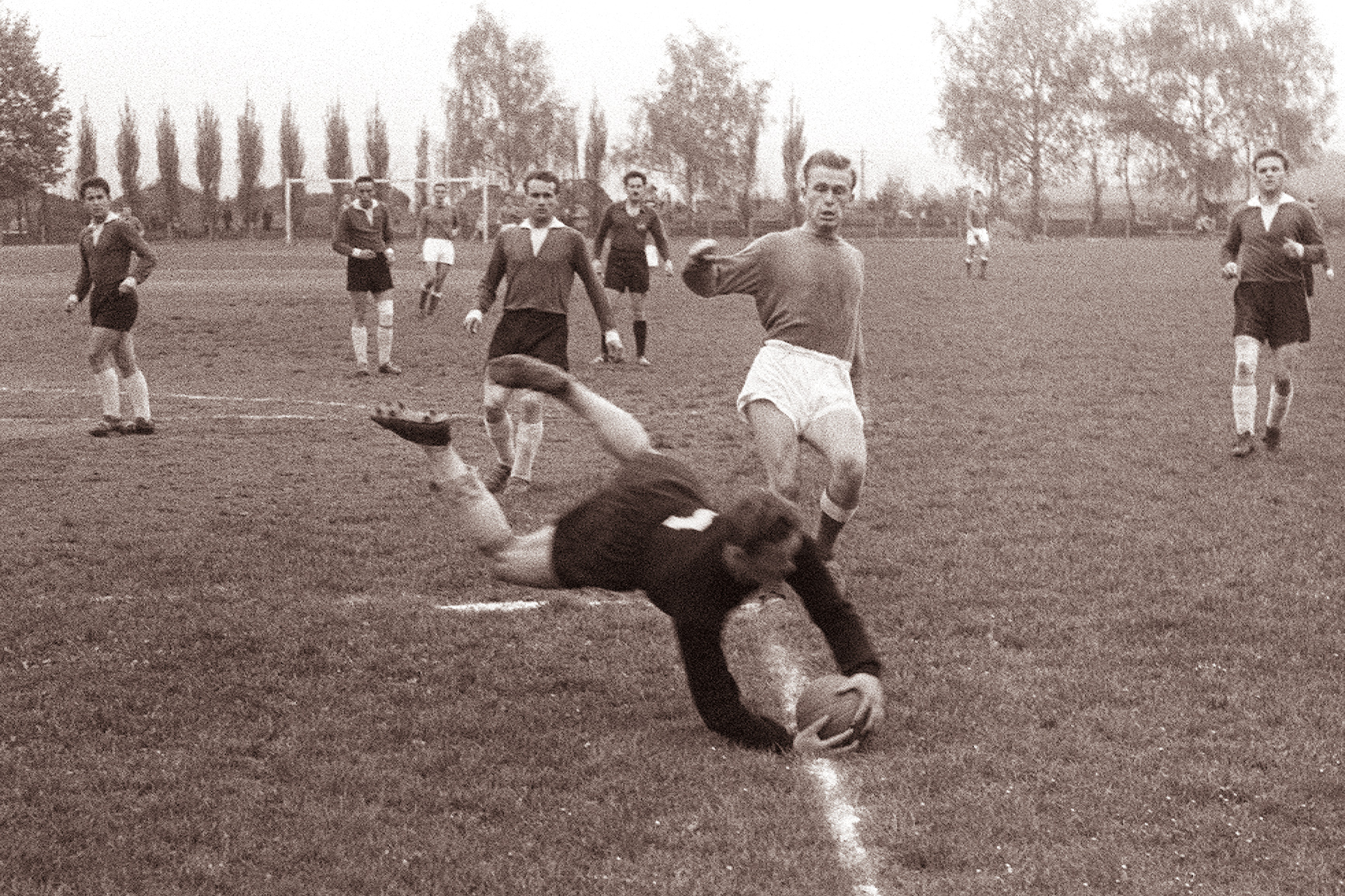 Nogometna tekma Maribor-Rudar.